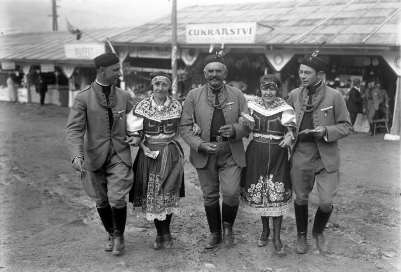 Das grösste Turnfest der Welt ! Das Sokolfest in Prag. Alle 5 bis 6 Jahre treffen sich die in dem Sokol-Verband zusammengeschlossenen Frauen und Männer zu einem Turnfest bei welchem mitunter 30 bis 40 000 Teilnehmer zusammenkommen. Sokol-Turner und Turnerinnen in ihrer Nationaltracht, auf dem Sokolfest in Prag.